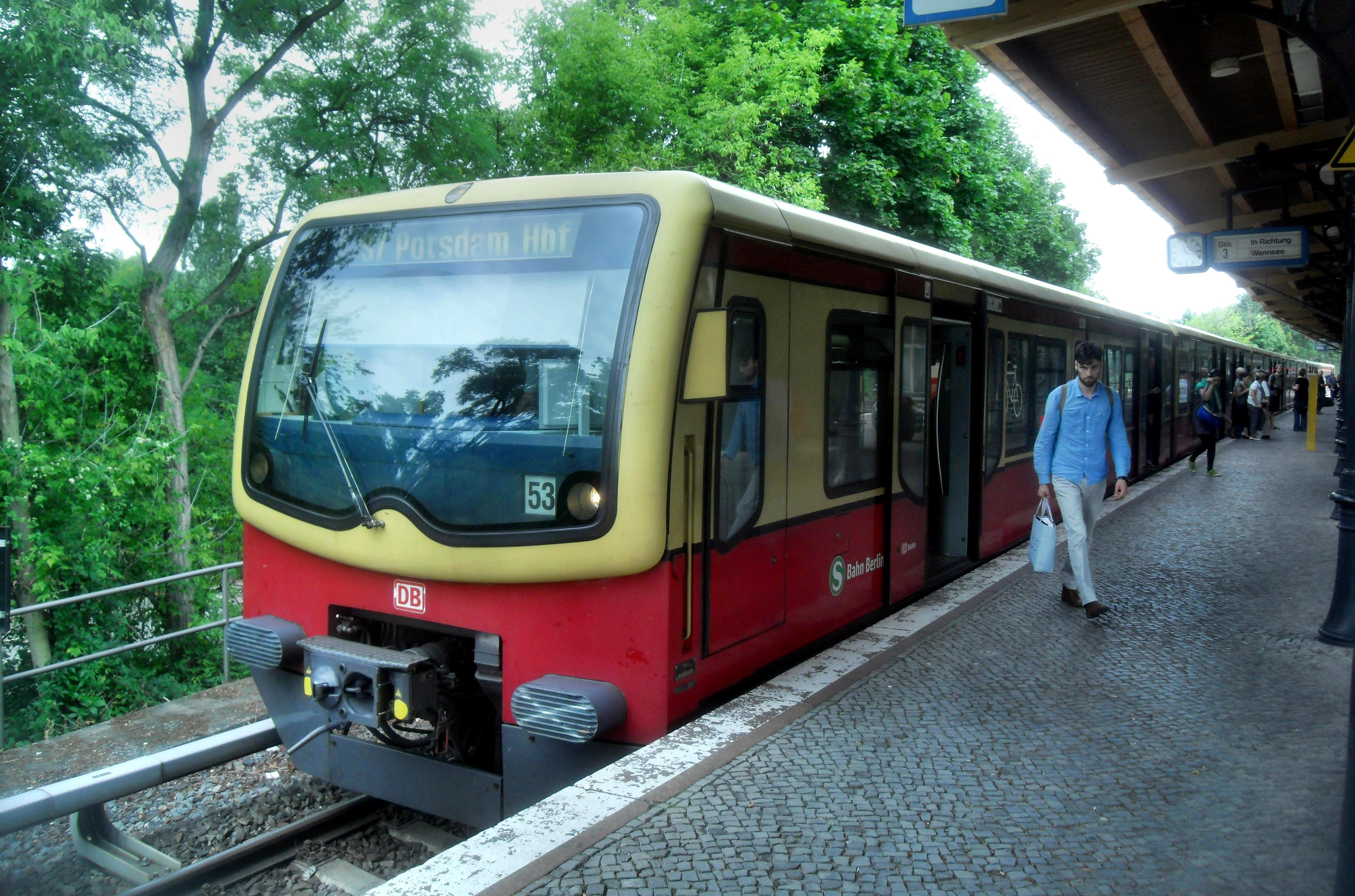 Triebwagen der DBAG-Baureihe 481 der S-Bahn Berlin auf der Linie S 7 im Bahnhof Berlin-Nikolassee auf dem Weg nach Potsdam in Brandenburg (Deutschland)